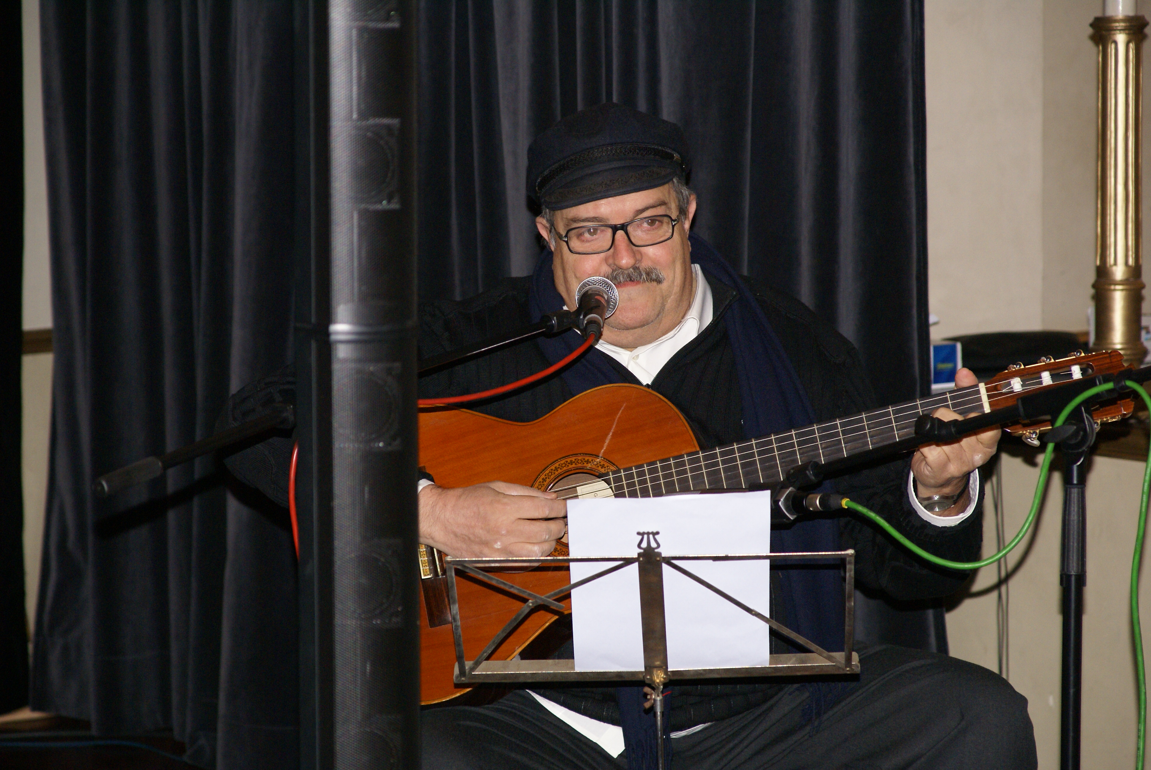 Actuació de Pere Tàpias al Foment